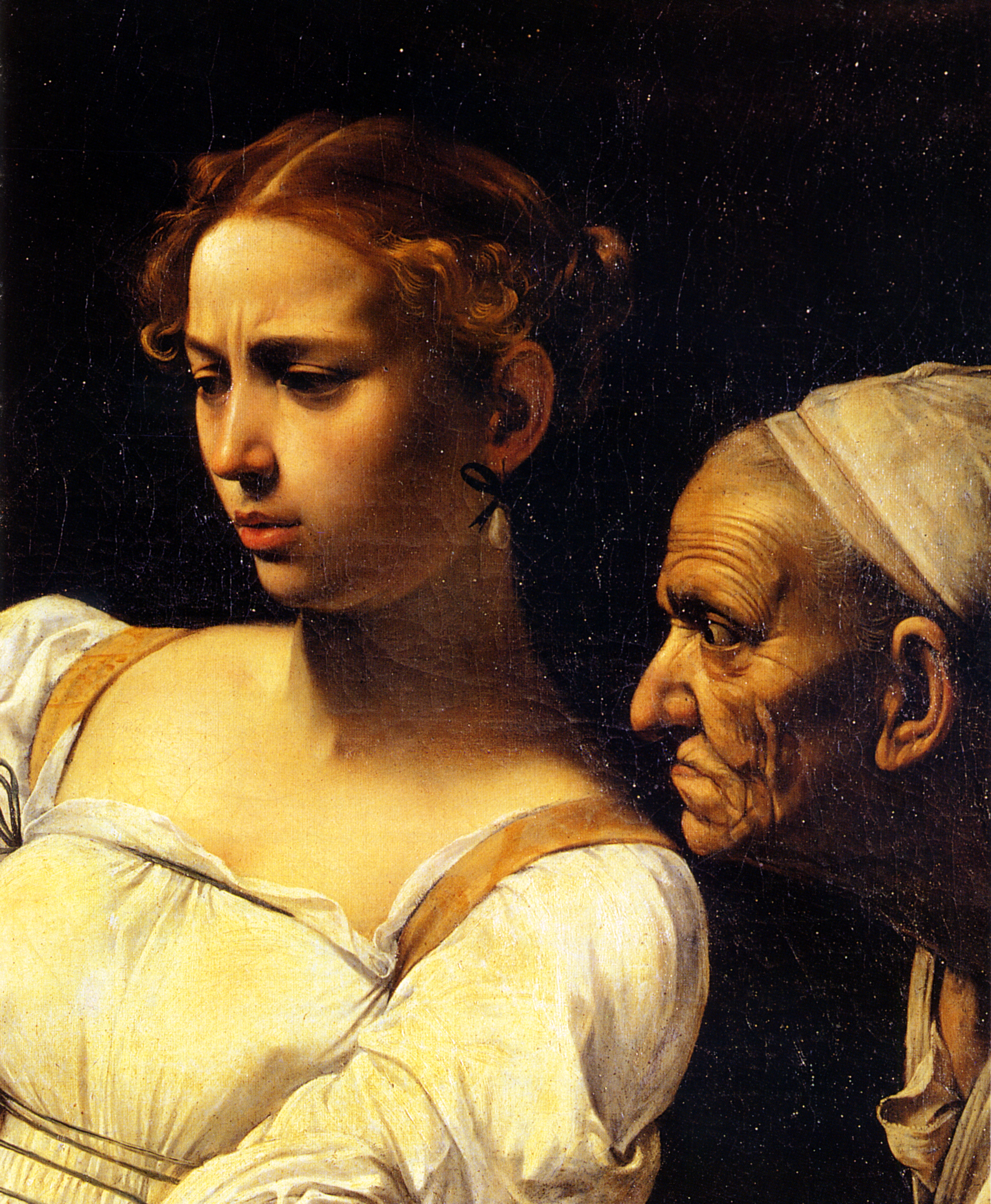 Giuditta e Oloferne (particolare 2) Caravaggio: Roma, Galleria Nazionale d'Arte Antica Palazzo Barberini